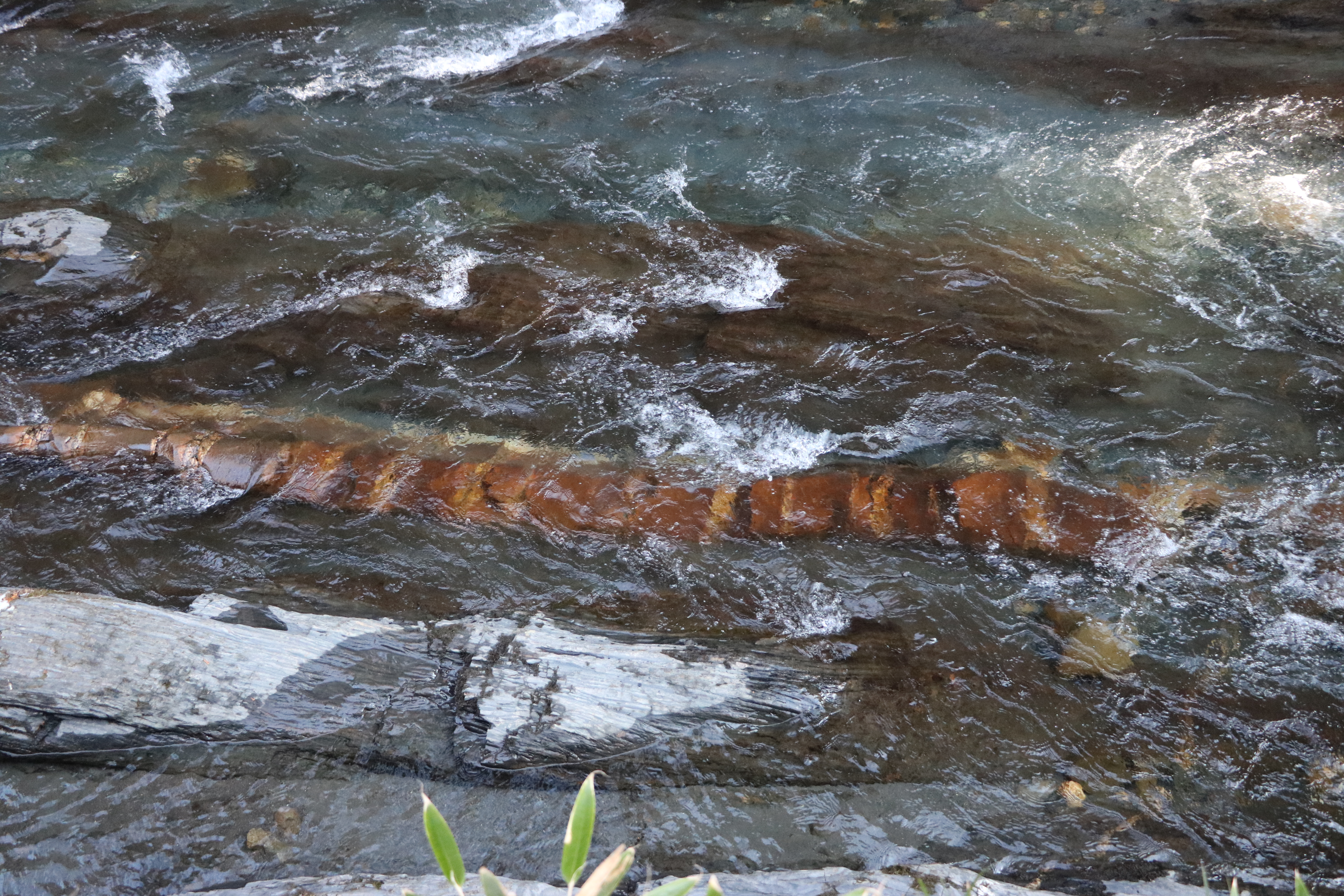 横川の蛇石。国の天然記念物。長野県上伊那郡辰野町。